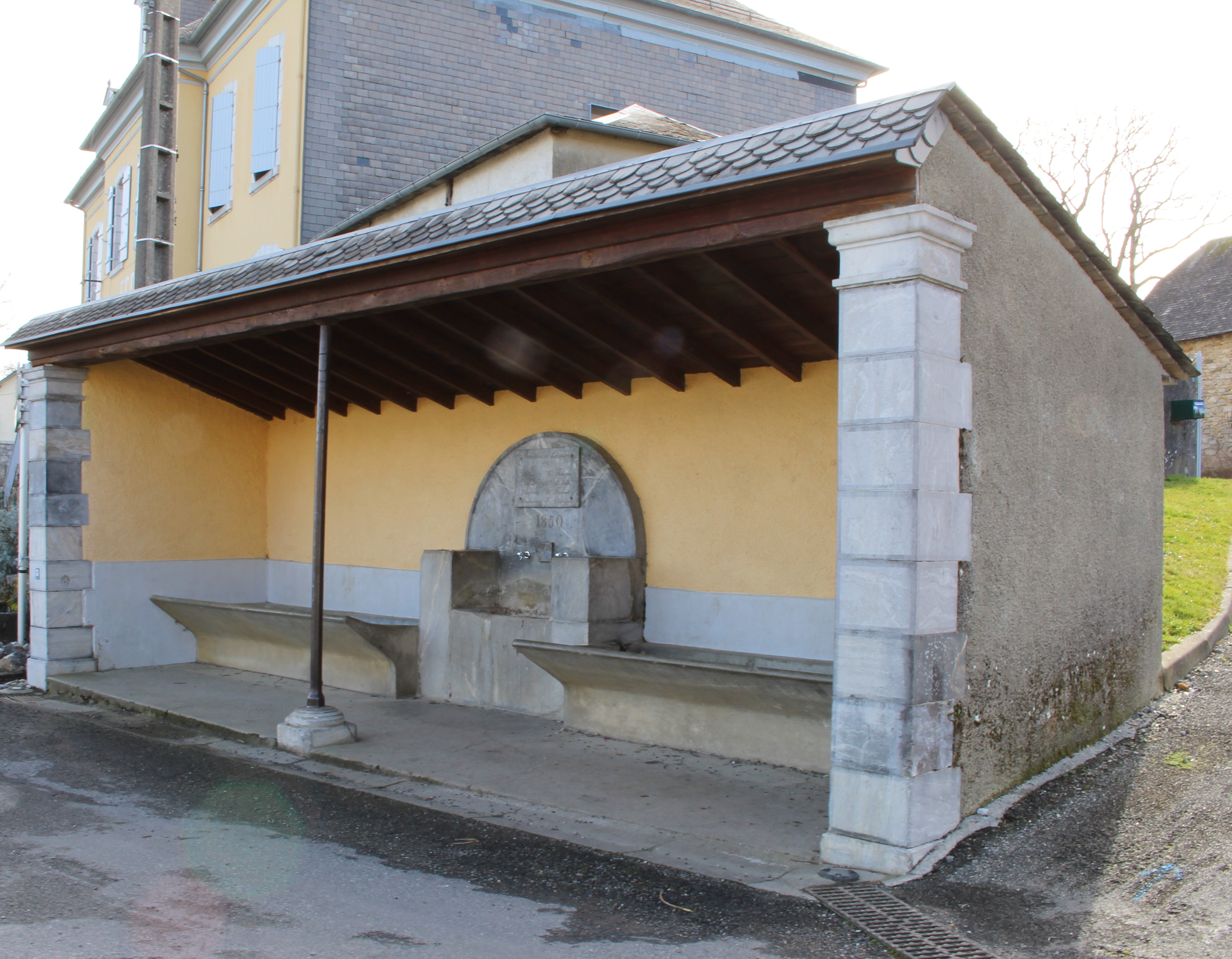 Lavoir de Labassère (Hautes-Pyrénées)